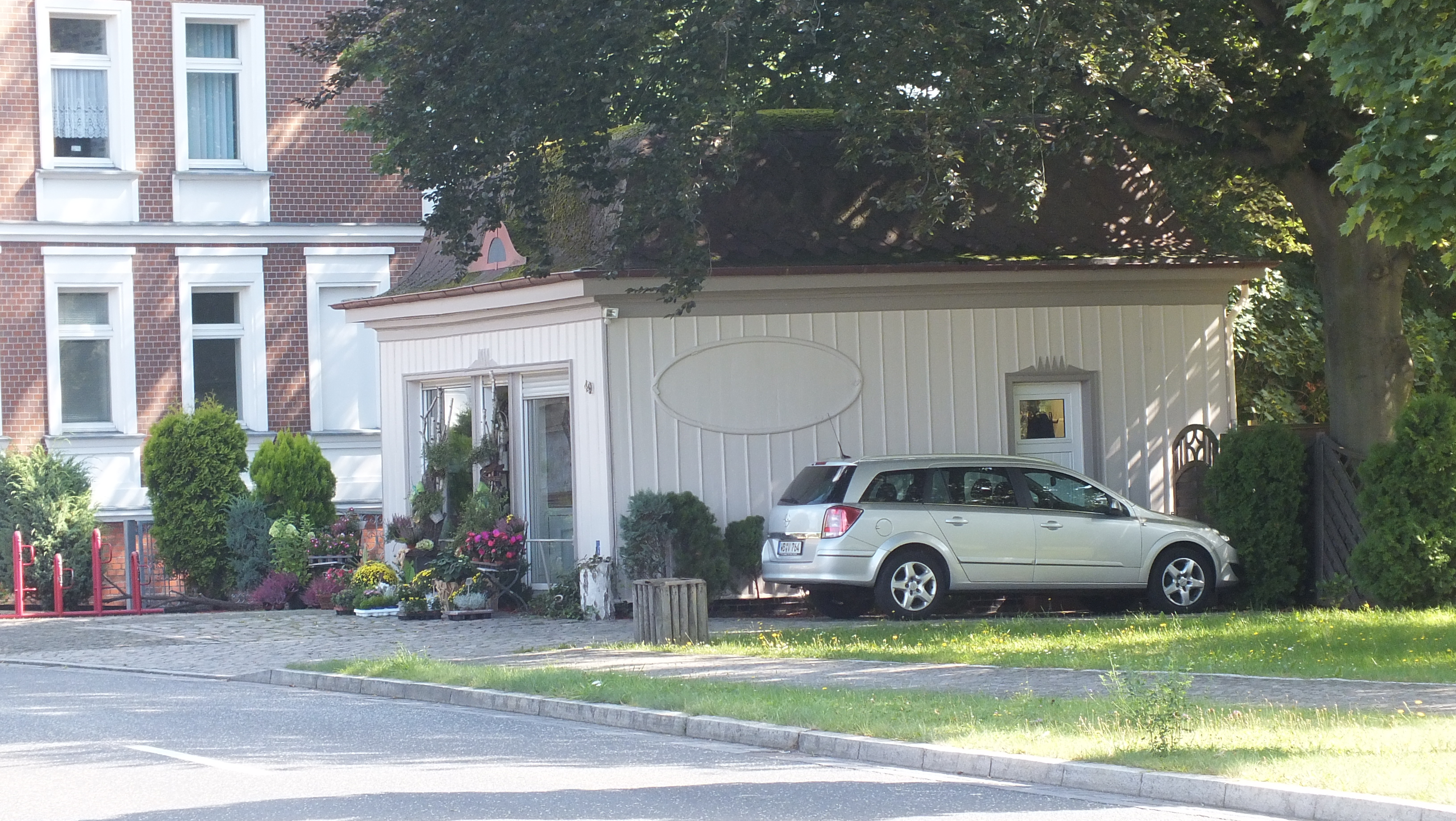 hölzerner Verkaufspavillon aus dem Jahr 1926 in Annaburg